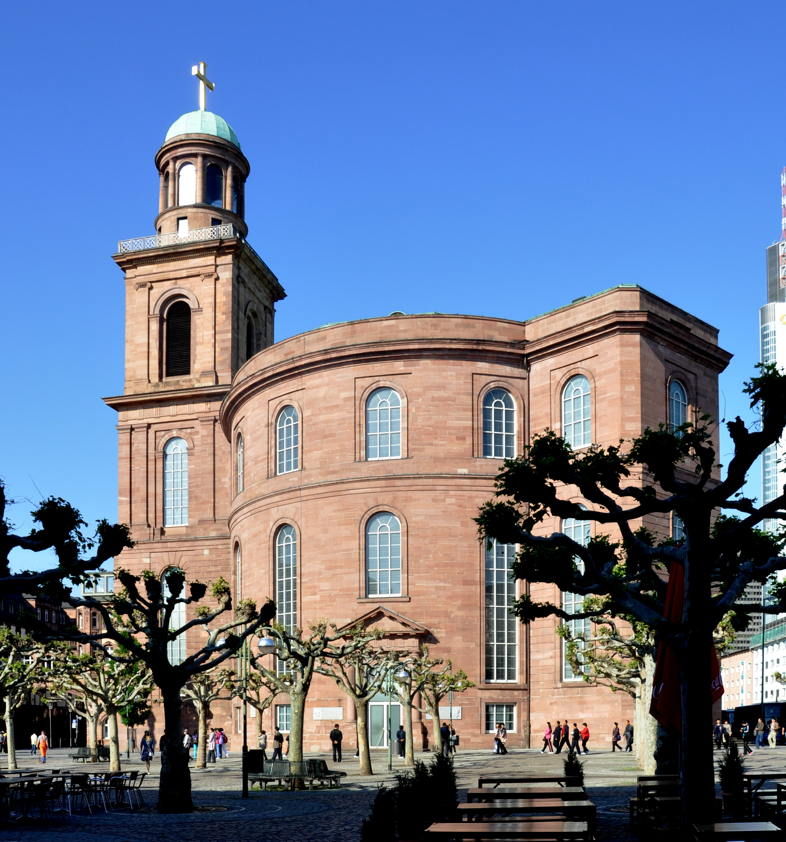 Frankfurt am Main, Paulskirche